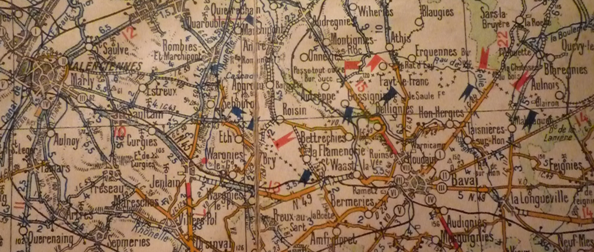 Tracé de l'ancienne Ligne Valenciennes-Faubourg-de-Paris - Hautmont, Nord-Pas-de-Calais, France